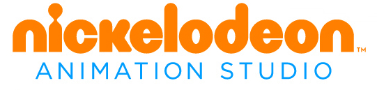 Logo Nickelodeon Animation